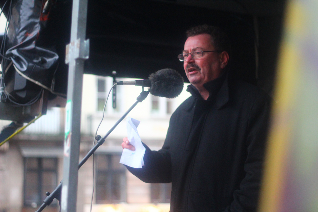 Per Clausens tale for enhedslisten til klima og miljø bevægelsernes demonstration under de globale klima forhandlinger til cop17 i Sydafrika december 2011. Han insistere på at vi kræver at vores pensions penge bliver brugt til at gennemføre klimatiltag der gør os uafhængige af fossile brandstoffer, så de unge får mulighed for at agere i fremtiden uden at forurene.